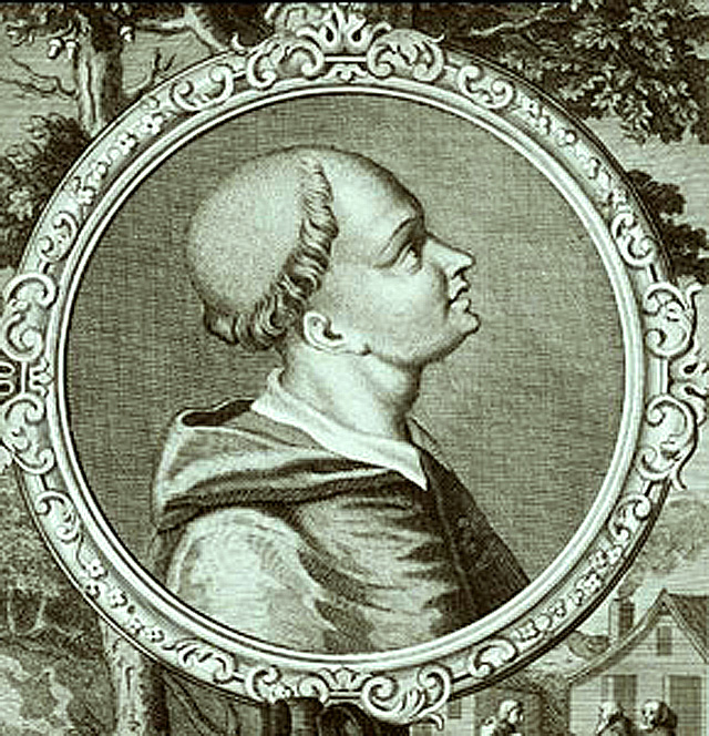 Cardinal Jean Allarmet de Brogny